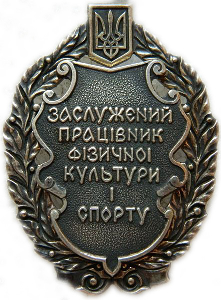 Заслужений працівник фізичної культури і спорту України — почесне звання України, яке надається Президентом України особам у галузі фізичної культури і спорту.